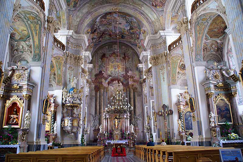 Brzeg, kościół klasztorny jezuitów, ob. par. p.w. Św. Krzyża, 1734, 1856